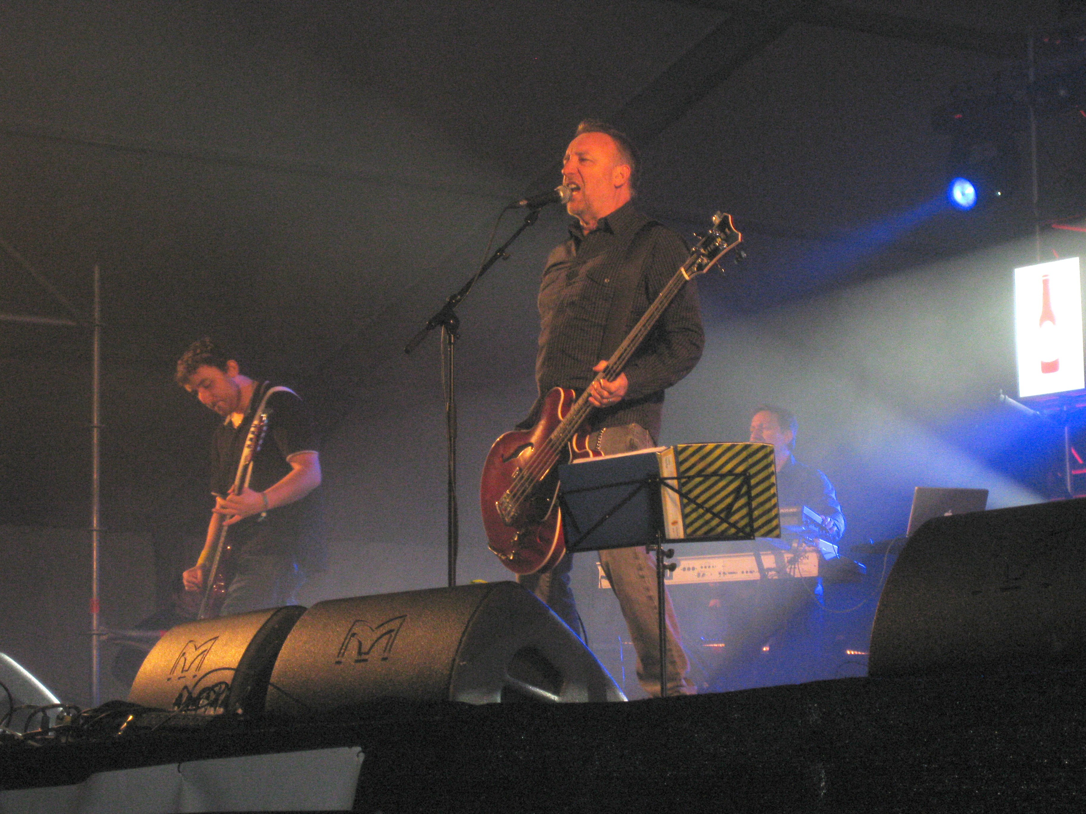 Peter Hook, ex-membro de Joy Division no Festival do Norte 2011, en Vilagarcía de Arousa.